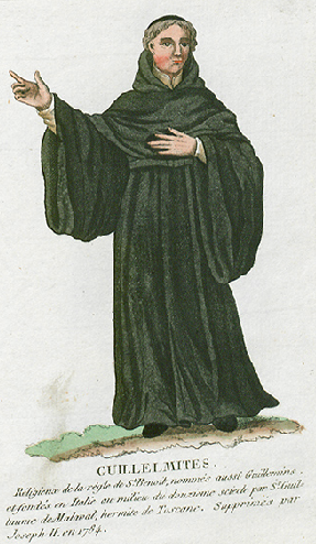 Collection de costumes de tous les ordres monastiques, supprimés à differentes époques, dans la ci-devant Belgique, Bruxelles, Philippe Joseph Maillart et sœur, 1811